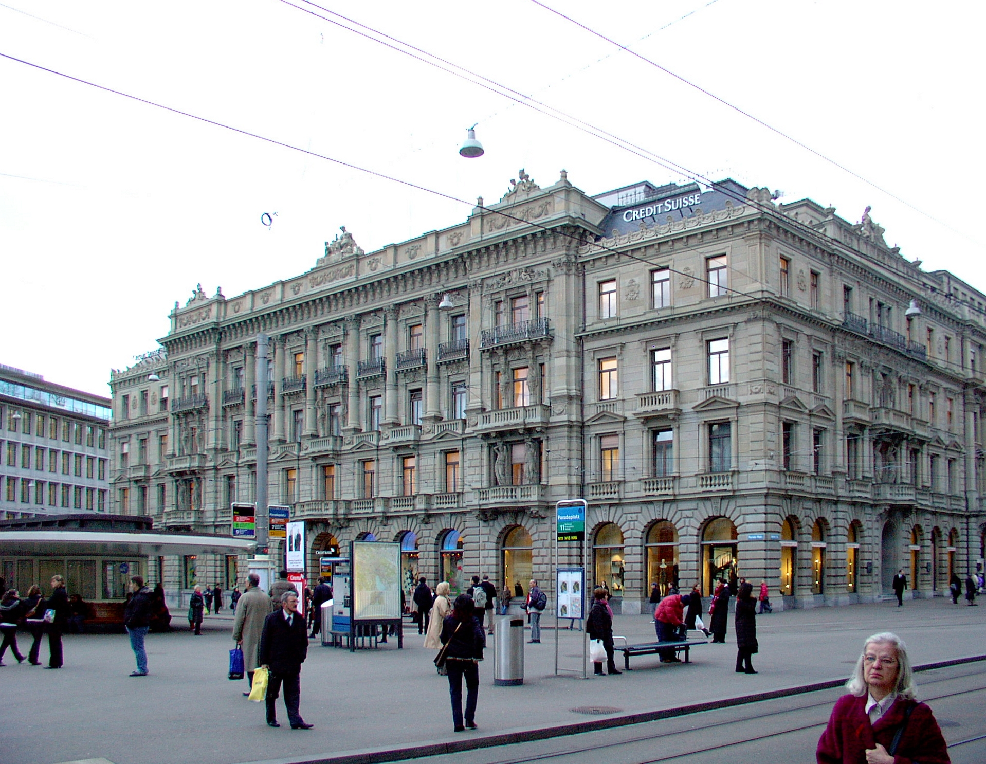 CS Hauptquartier am Zürcher Paradeplatz